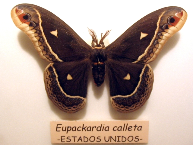 Polilla de la seda norteamericana (Eupackardia calleta)